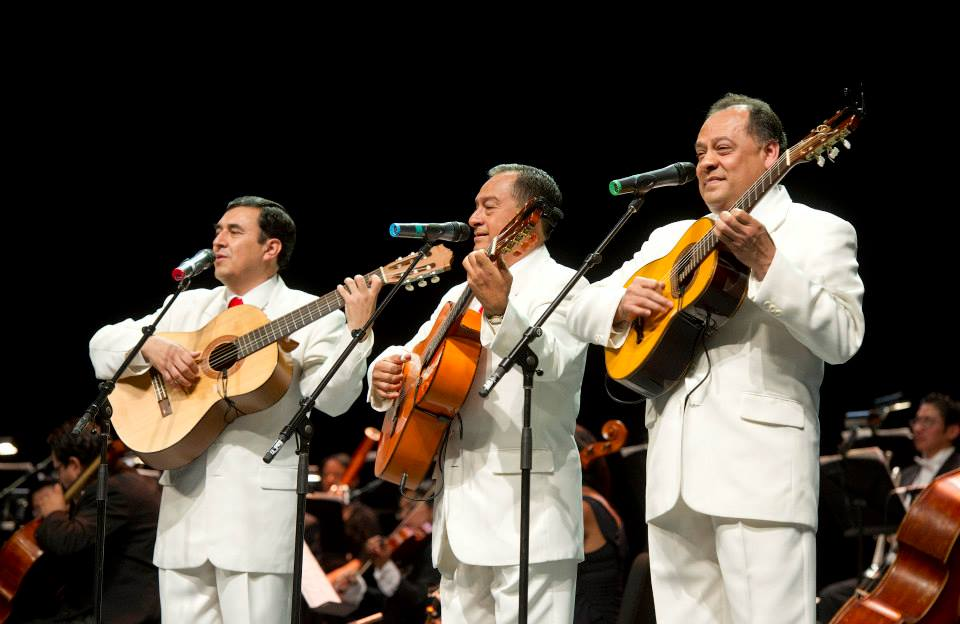 Los Panchos